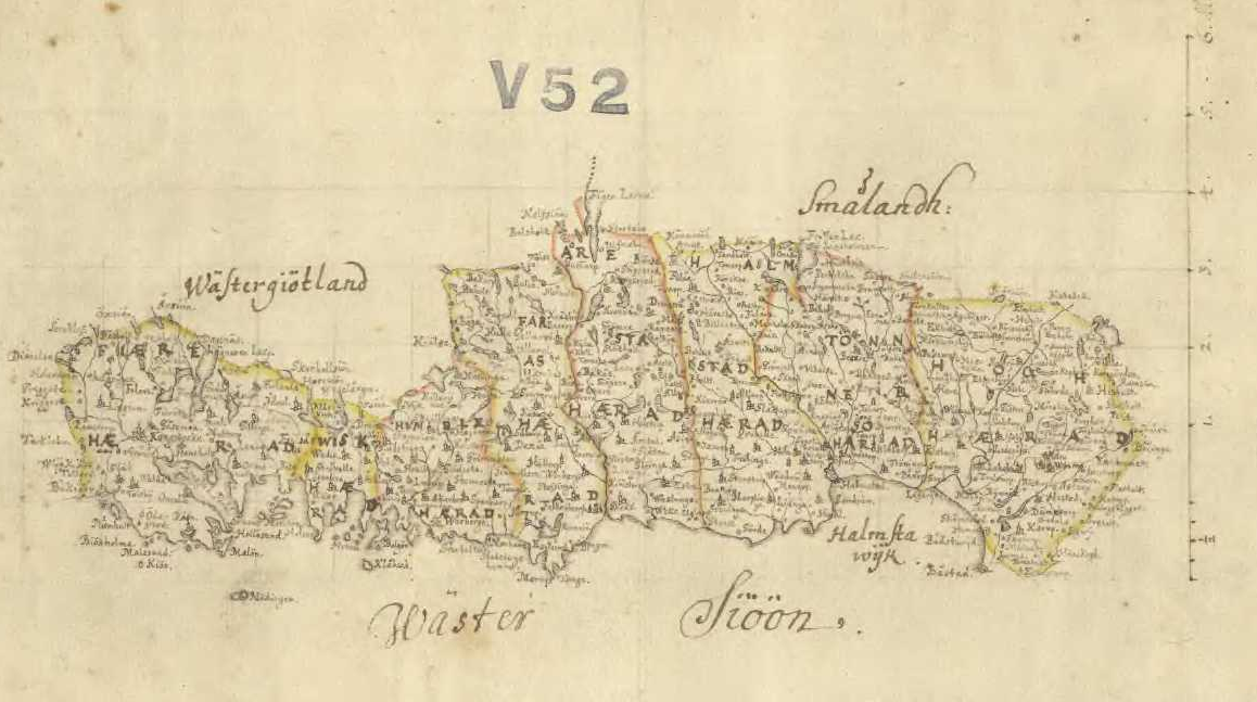 Old map of Halland.